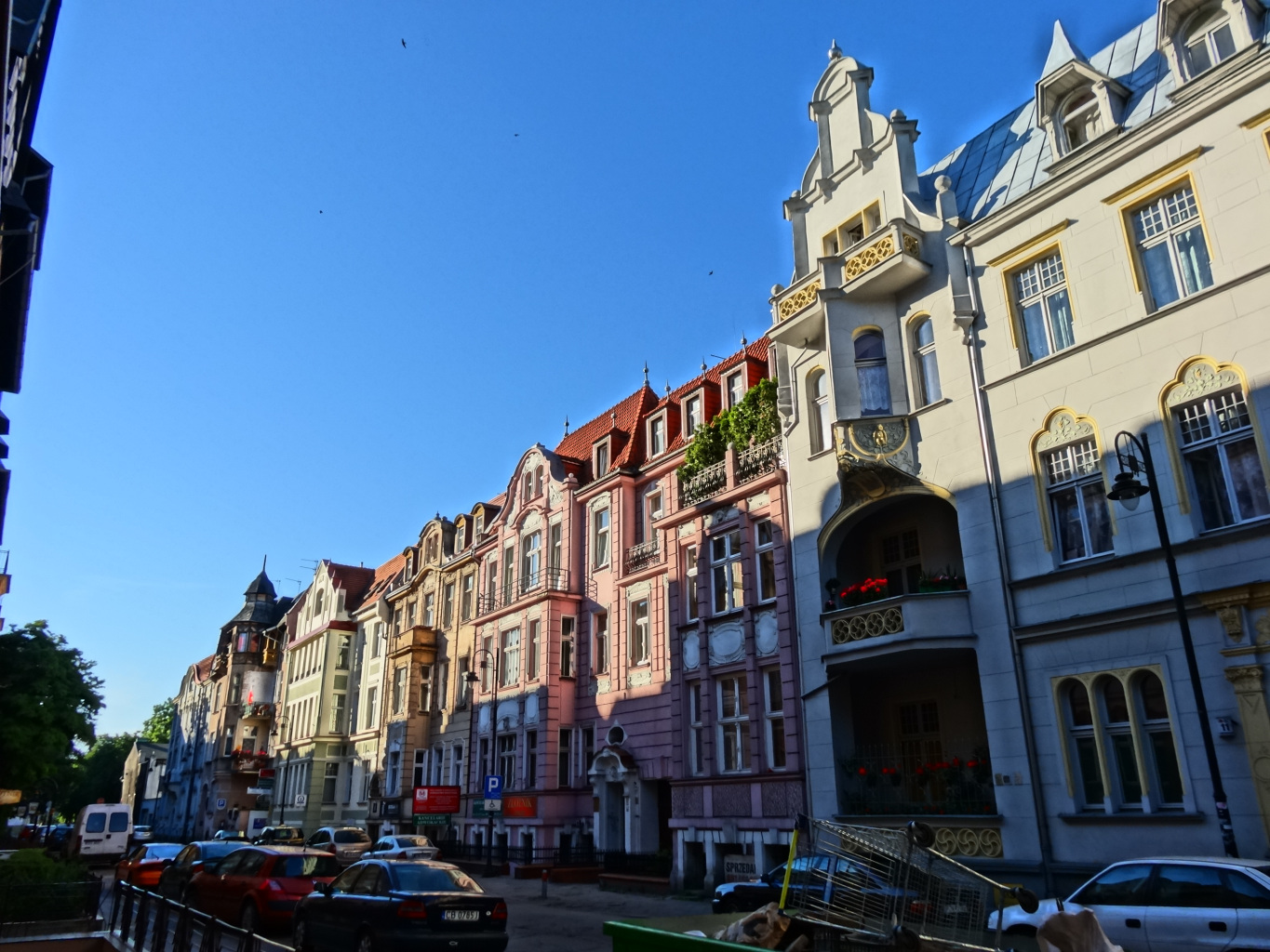 Ulica Augusta Cieszkowskiego w Bydgoszczy – pierzeja południowa